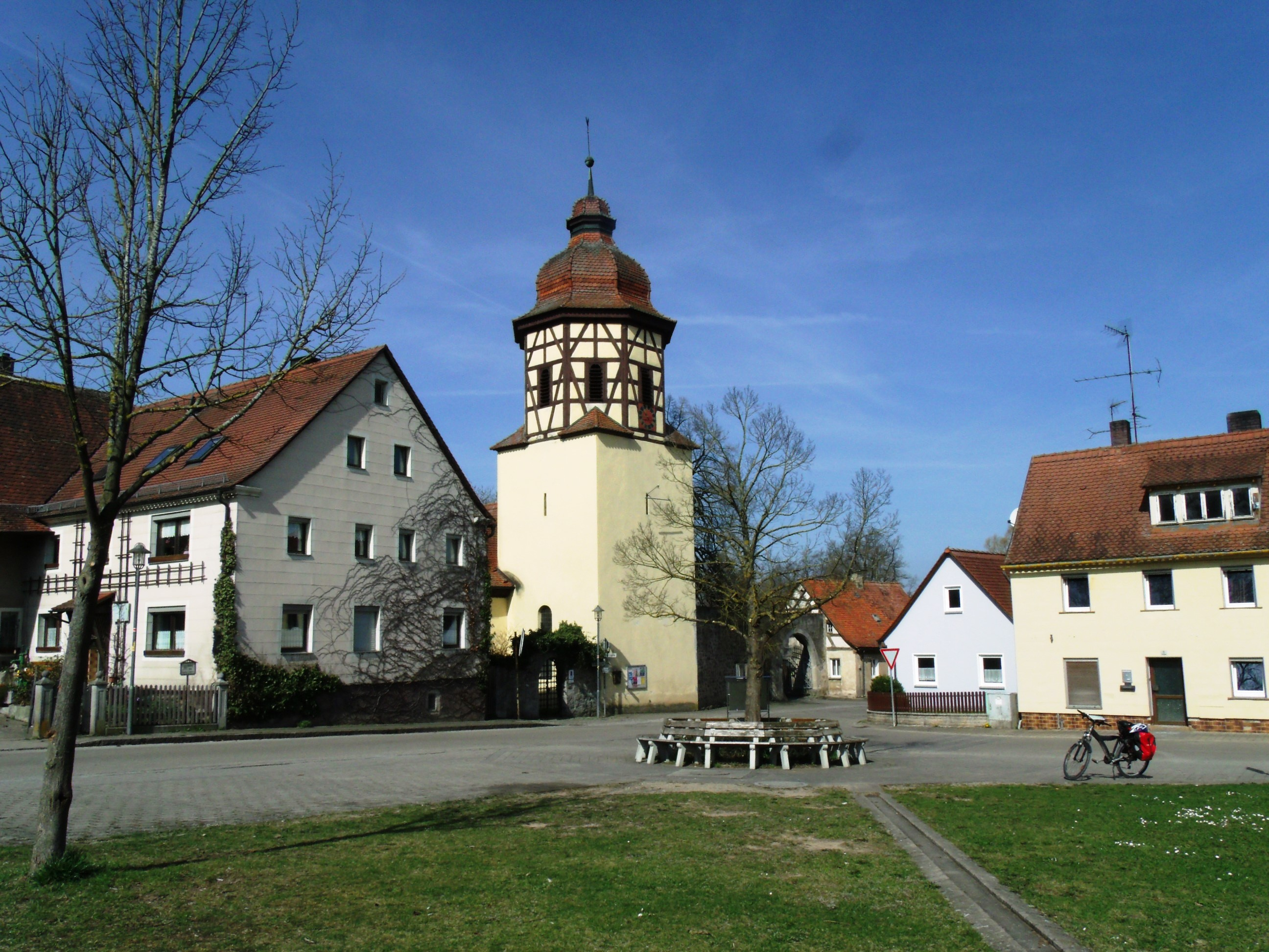 Wiedersbach, Ortsteil von Leutershausen im Landkreis Ansbach, Turm der ehemaligen Schlosskirche derer von Eyb